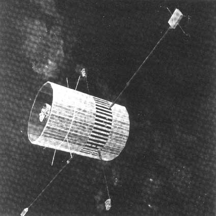 Explorer-47 (IMP-I) satellite